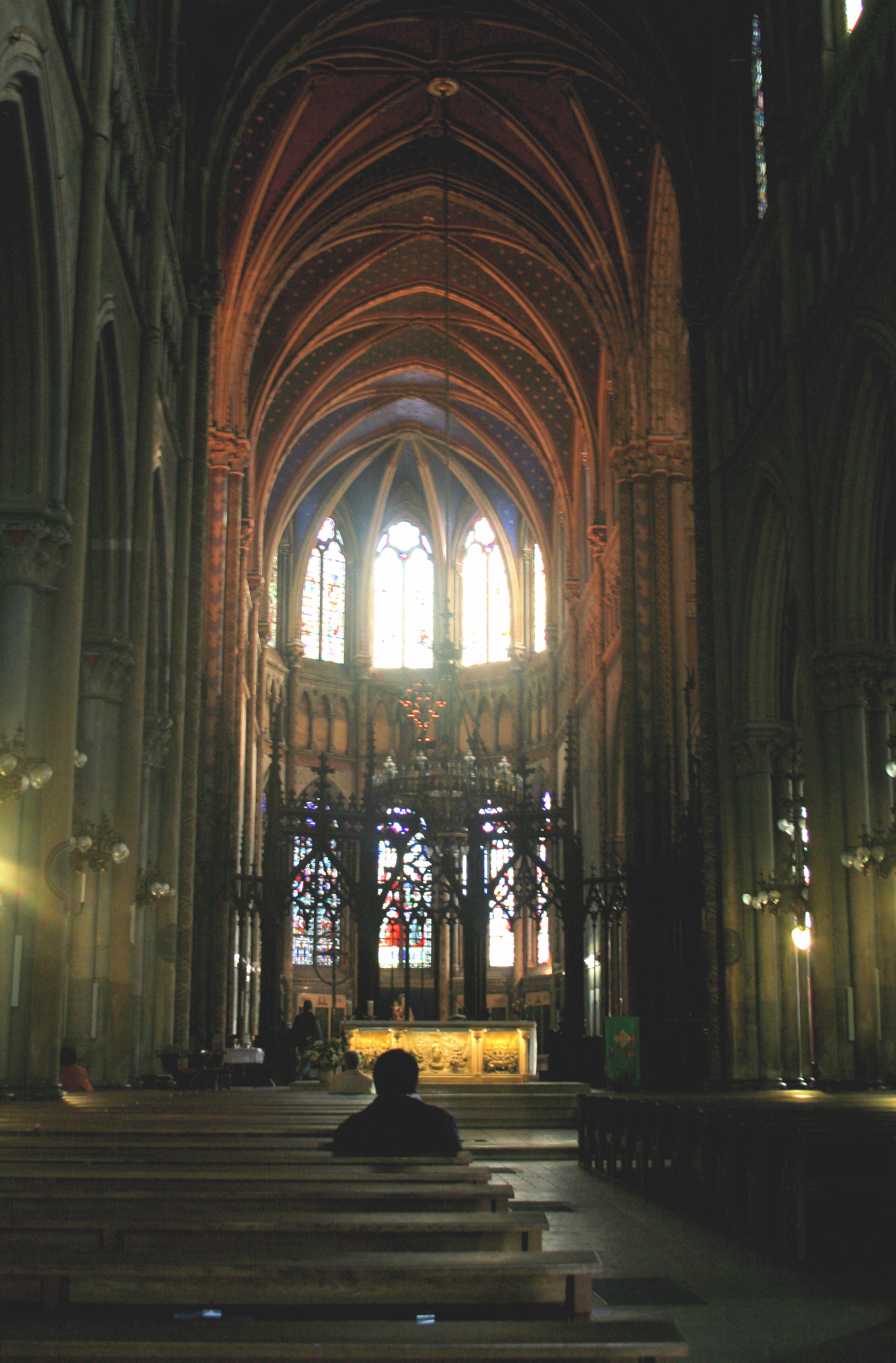 Voiron (Isère) - Nef de Saint-Bruno.